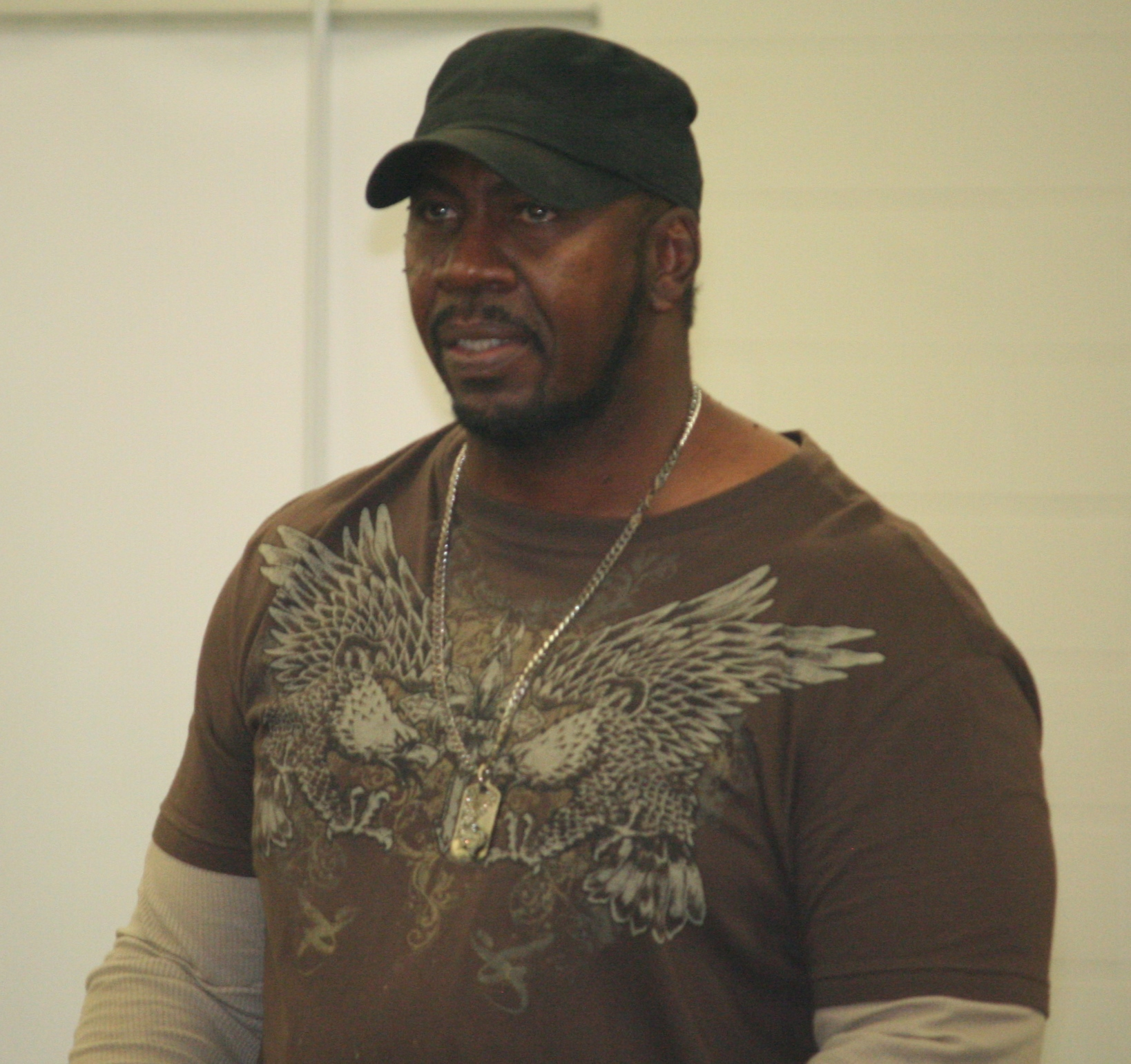 Stevie Ray en novembre 2015